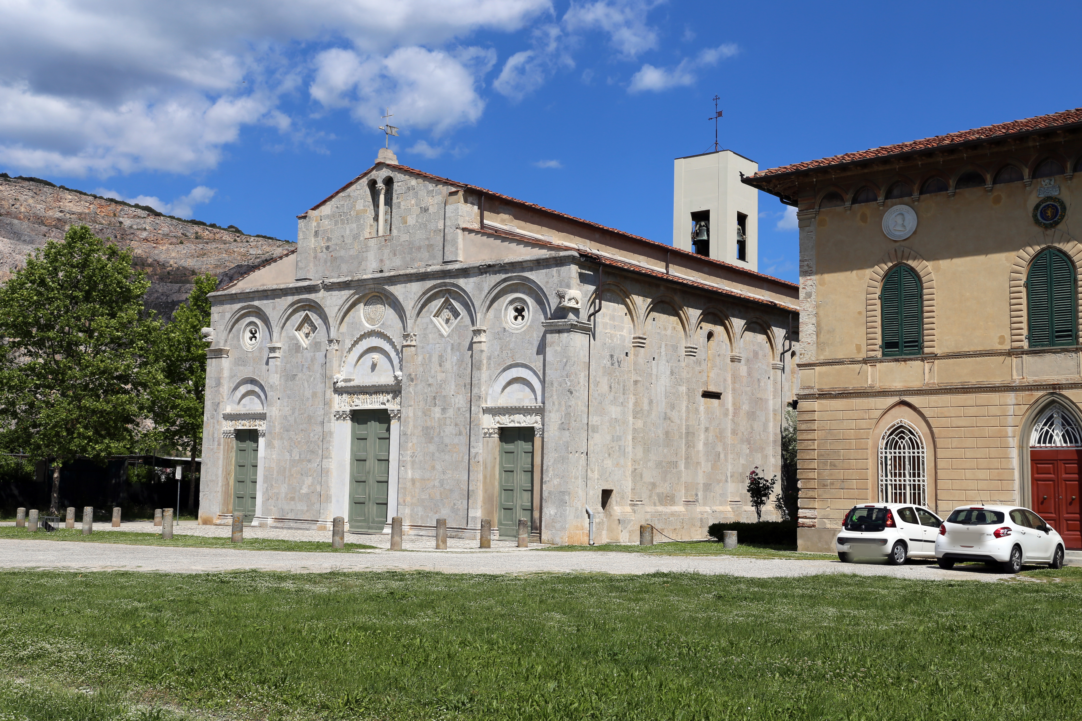 Santi Ippolito e Cassiano (San Casciano - Pisa)